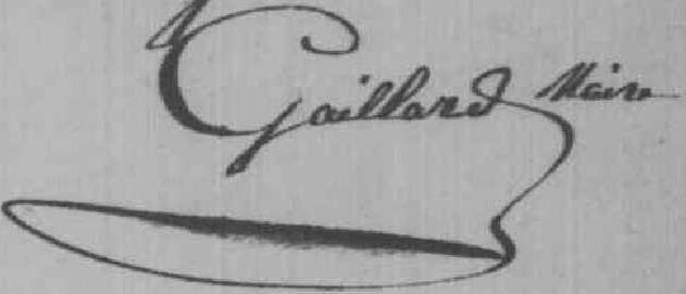 Signature